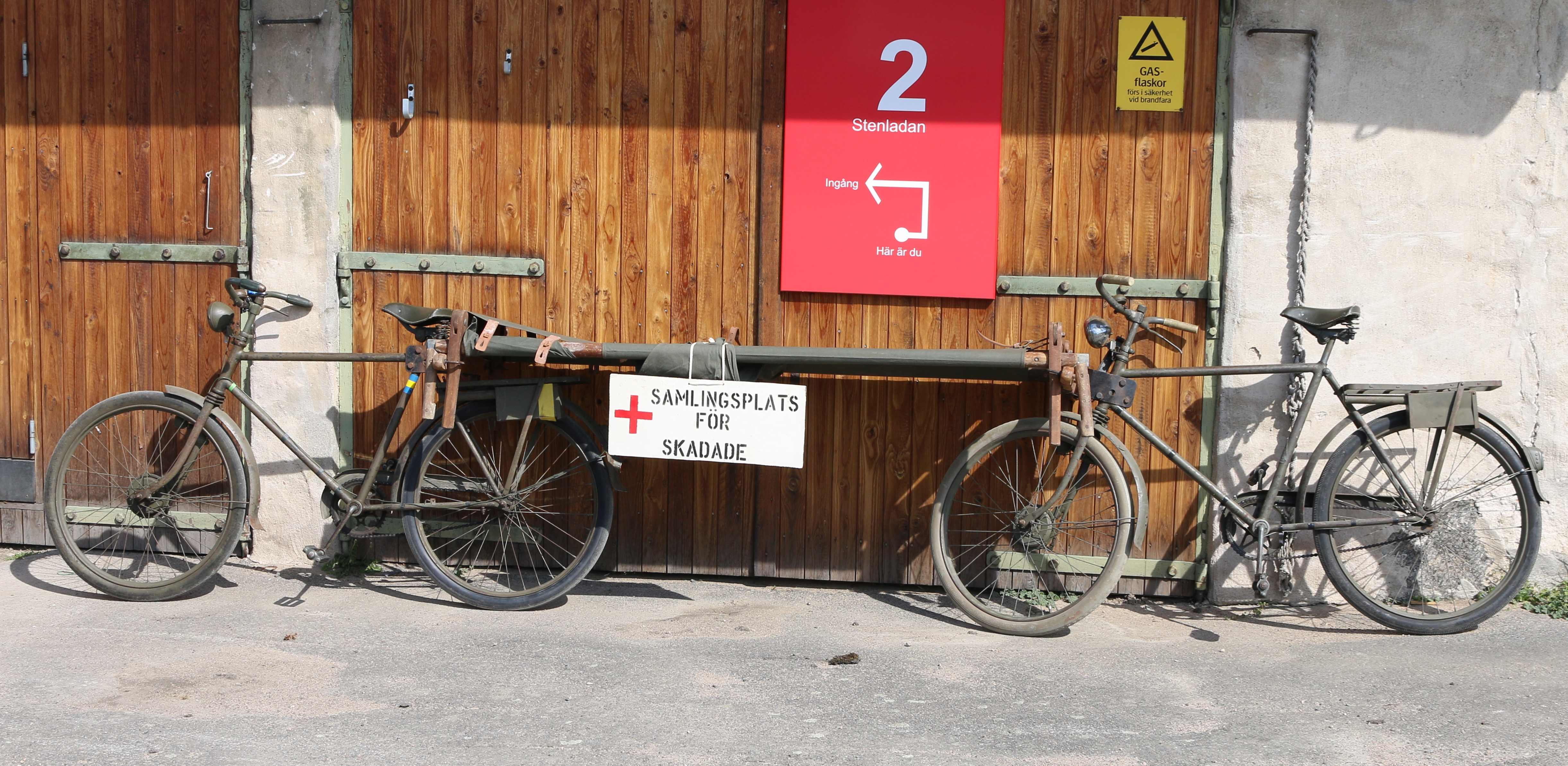 Sjuktransportcyklar Artillerimuseet 2017